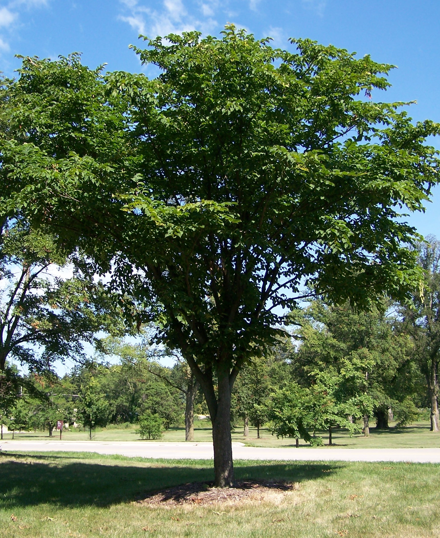 Nikko Elm - Ulmus laciniata var. nikkoensis. Morton Arboretum acc. 180-84-1.